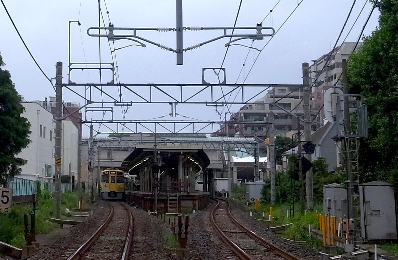 花小金井駅のホーム(Hanakoganei station platforms)